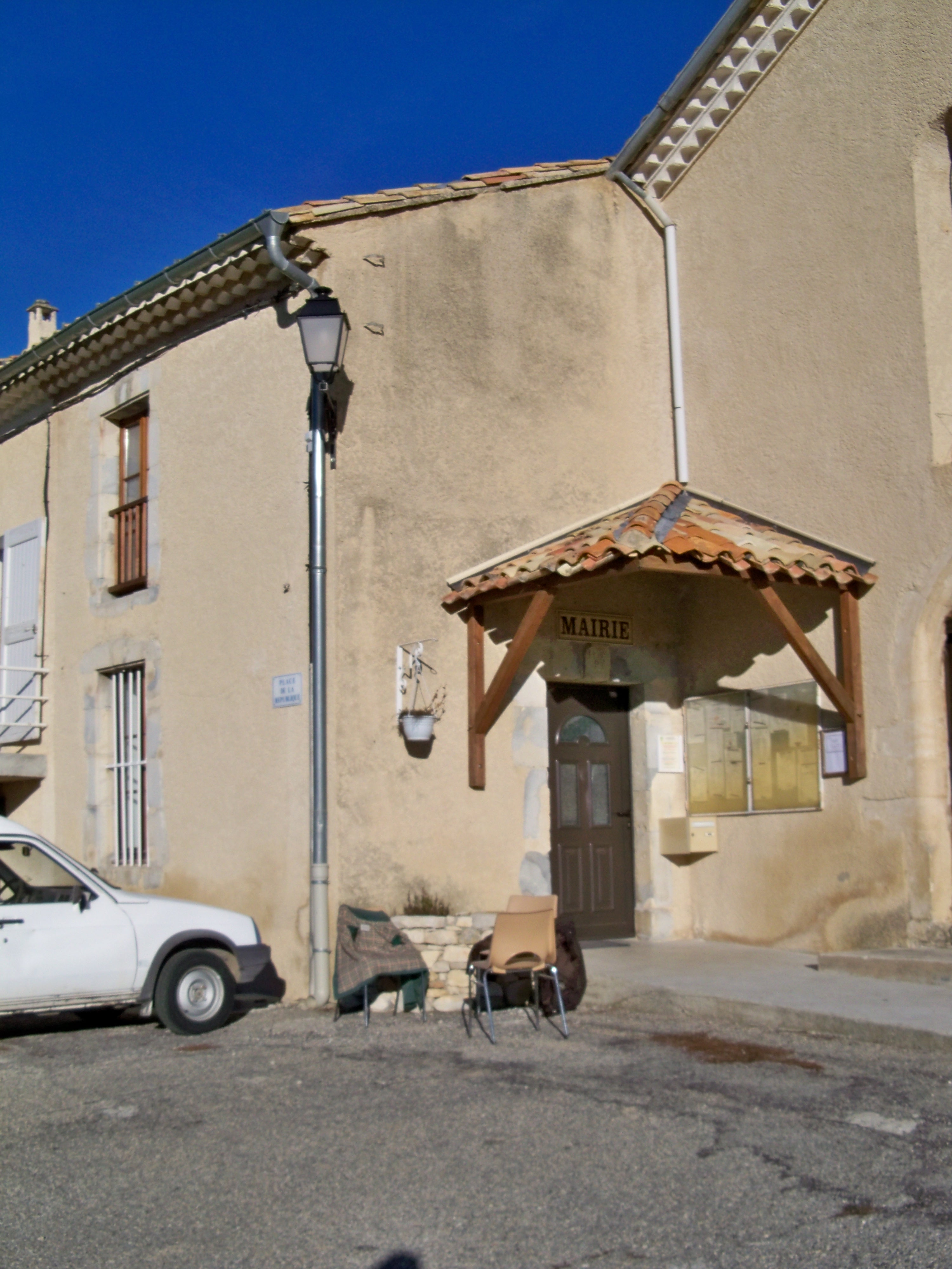 Mairie de Saumane (04), France